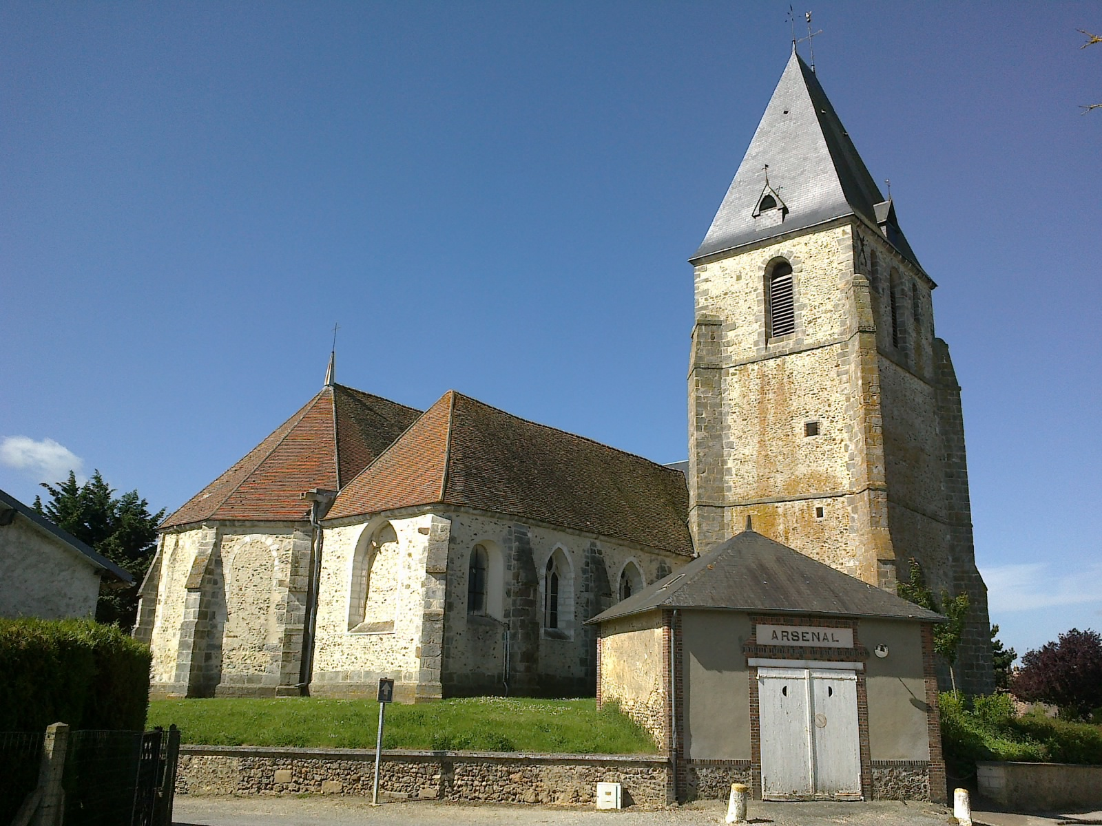 Eure-et-Loir Broué église côté ouest Arsenal.